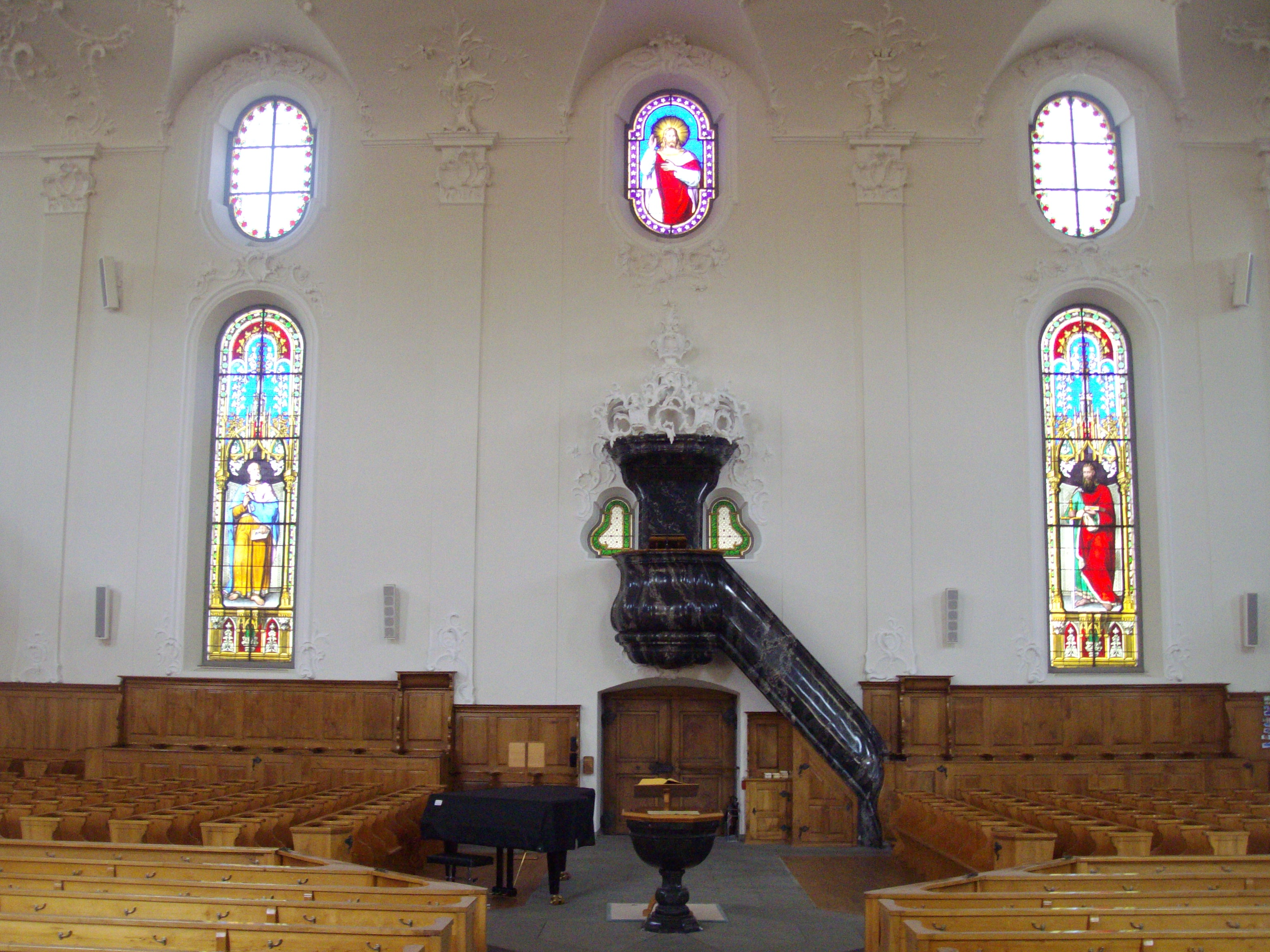 Innenraum der Reformierten Kirche Wädenswil (1764-1767)